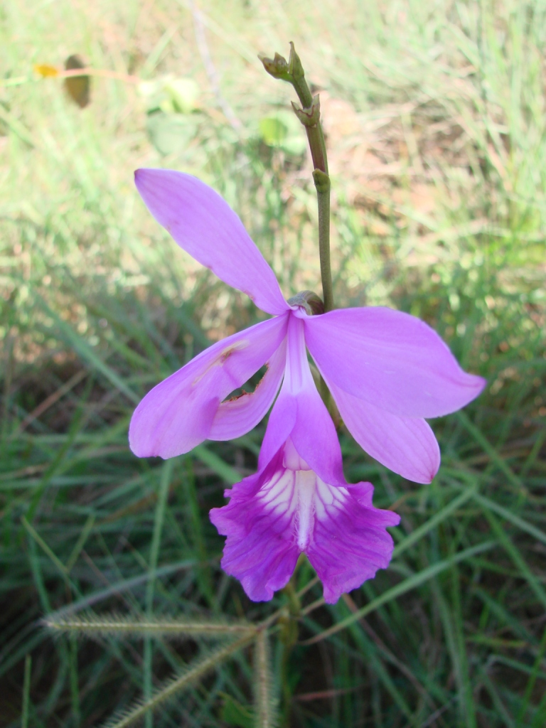 Epistephium sclerophyllum - ORCHIDACEAE Parque Nacional da Chapada dos Veadeiros - Cavalcante - Goiás - Brasil